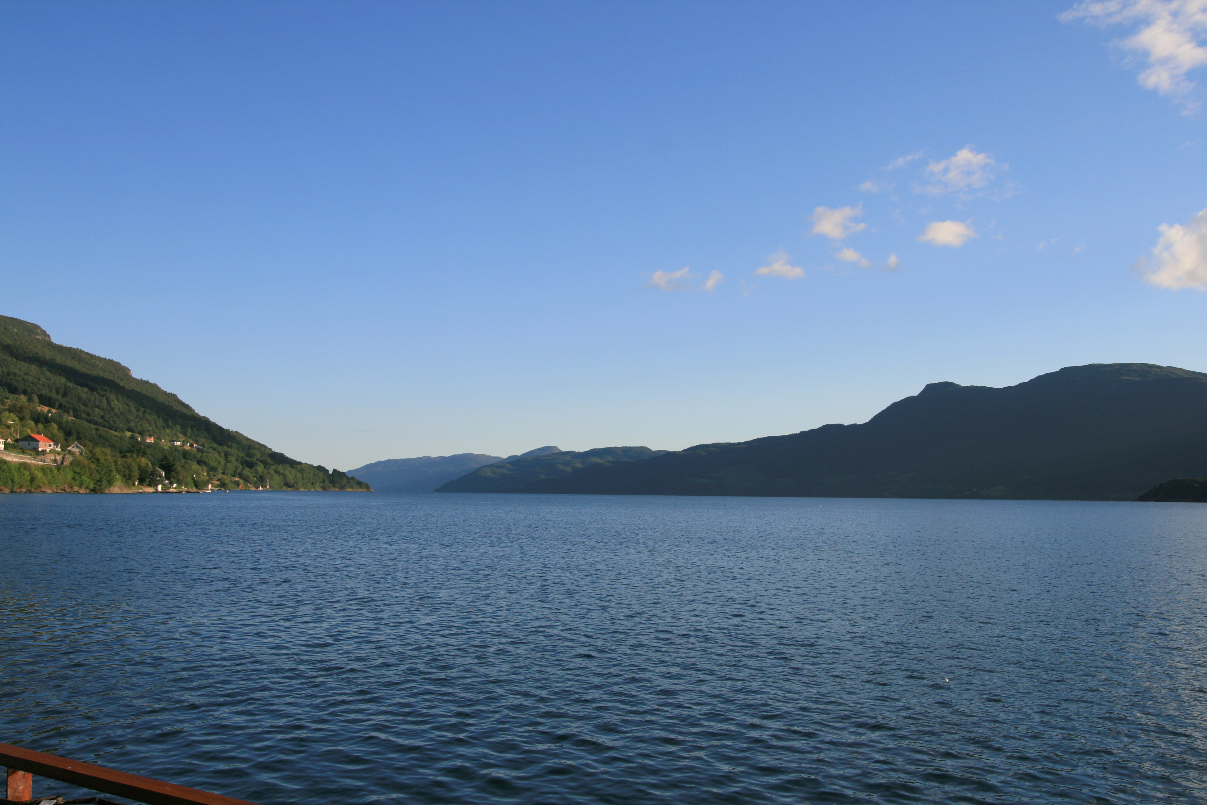 Sandeidfjorden